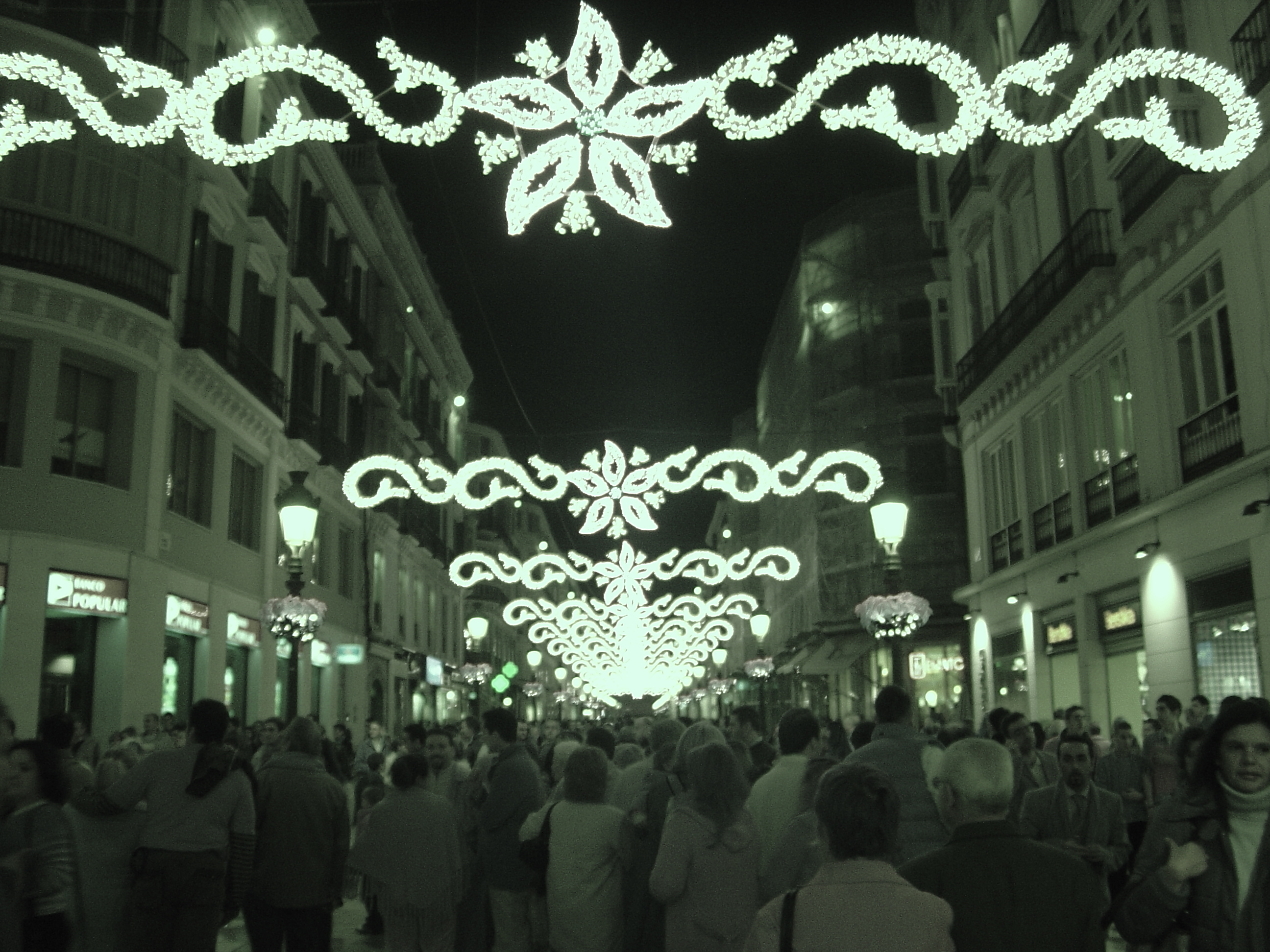 Malaga in Xmas